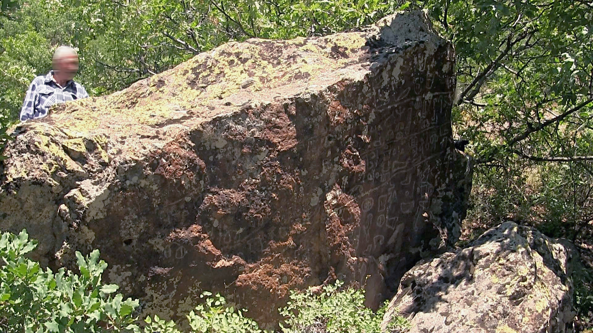 Şırzı, späthethitische Felsinschrift bei Hekimhan, Zentraltürkei